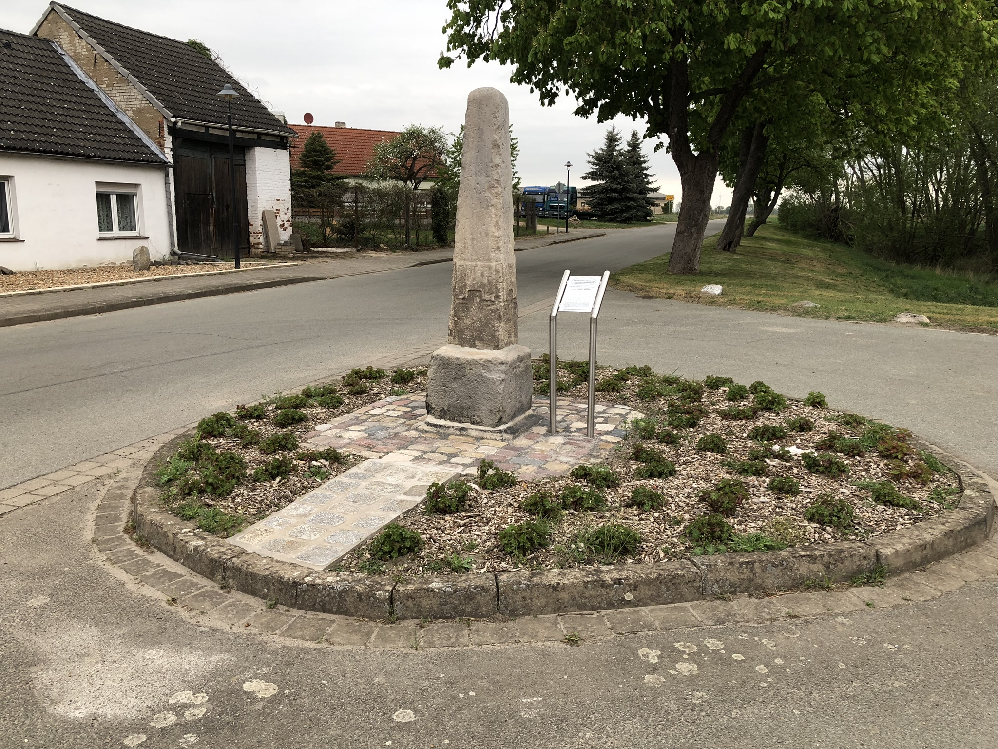 Der Posthalbmeilenstein in Wustrewe.